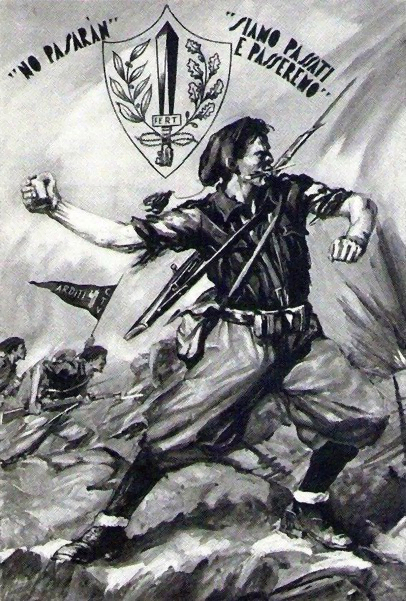 Arditi agitational poster